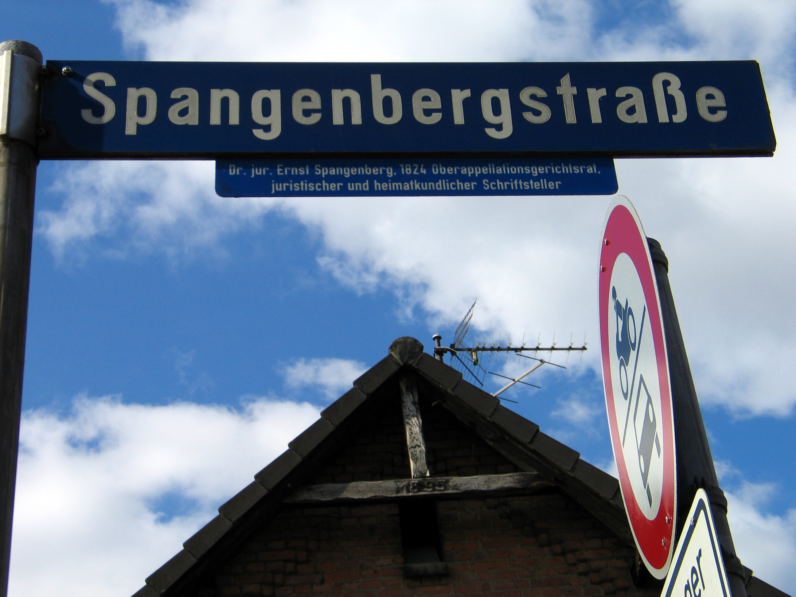 Die Spangenbergstraße in Celle mit Legende: „Dr. jur. Ernst Spangenberg, 1824 Oberappelationsgerichtsrat, juristischer und heimatkundlicher Schriftsteller“ ...